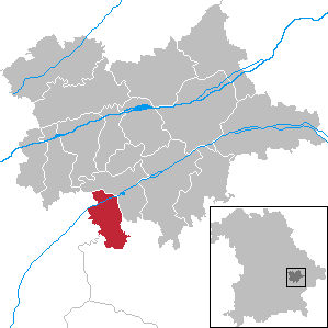 Frontenhausen in Bavaria - District Dingolfing-Landau